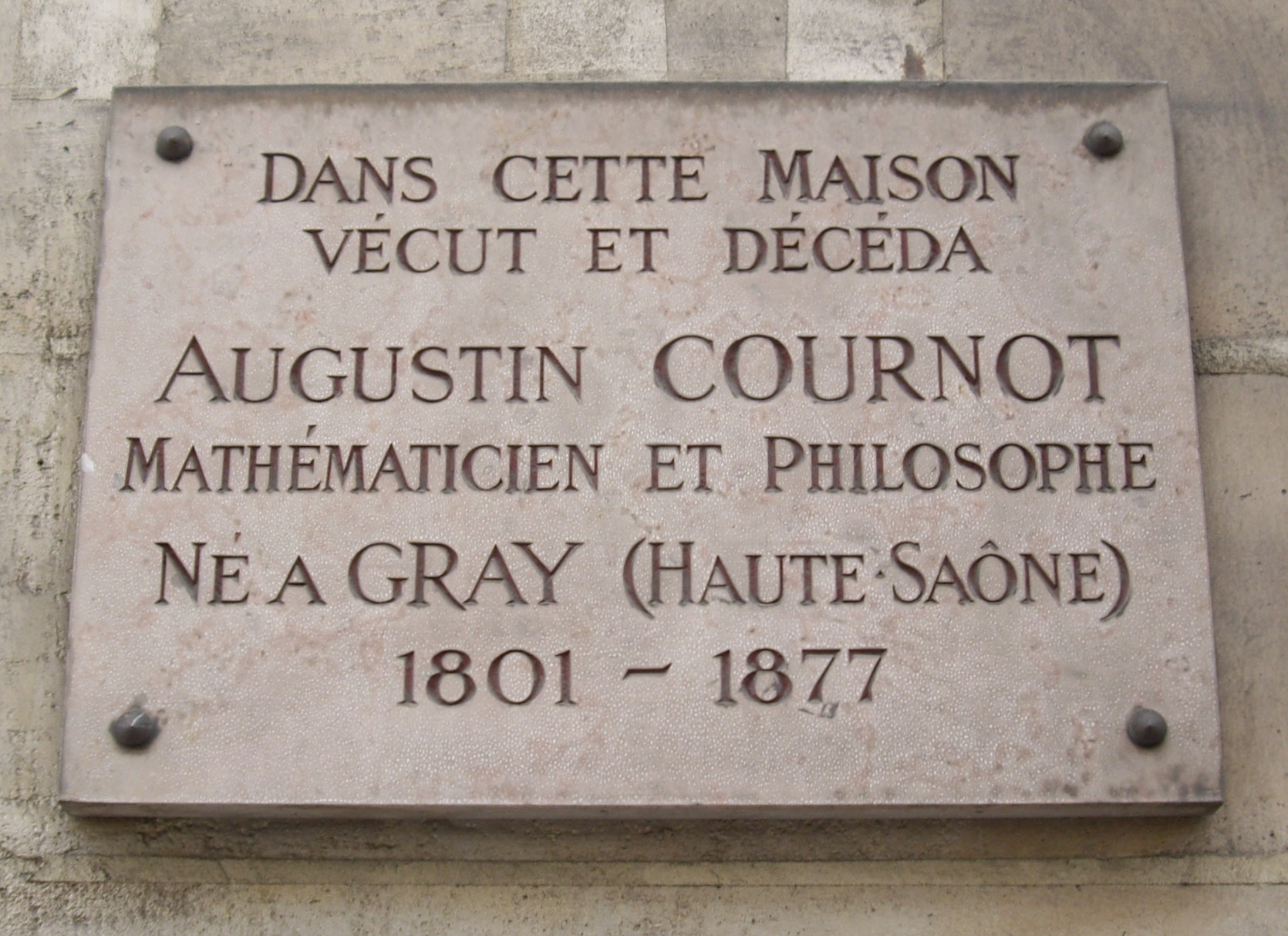 Plaque apposée au n° 2 de la rue de Tournon, Paris 6e, où habita le mathématicien et philosophe Antoine-Augustin Cournot (1801-1877) jusqu'à sa mort en 1877.